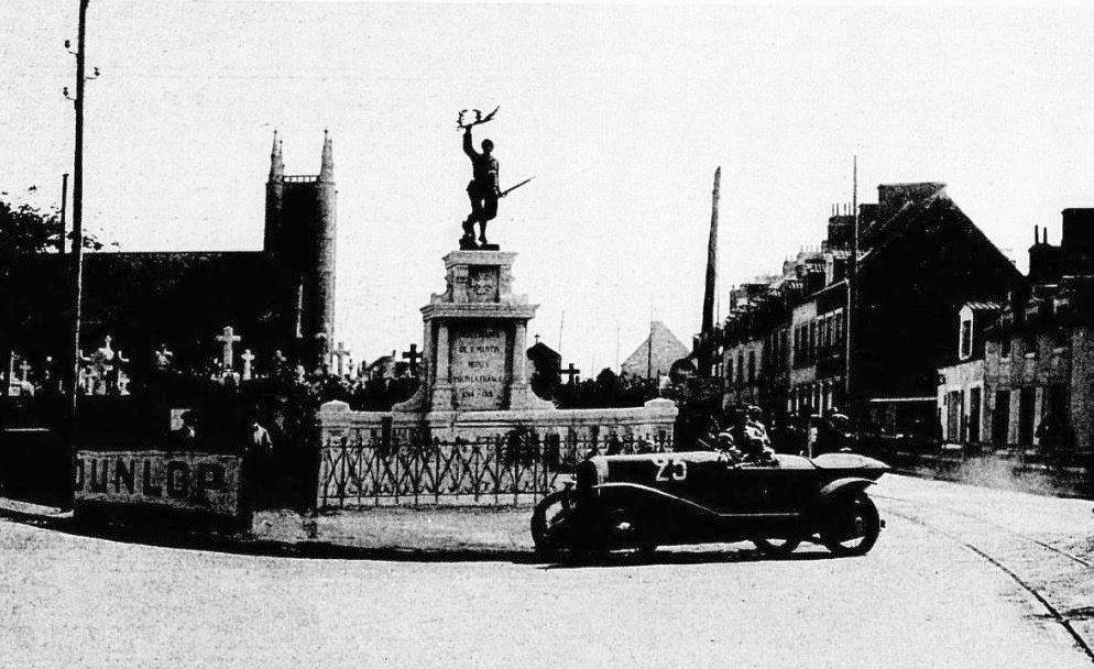 André Pisart, vainqueur de la Coupe Georges Boillot 1923 sur Chenard & Walker 3L. (virage du cimetière).